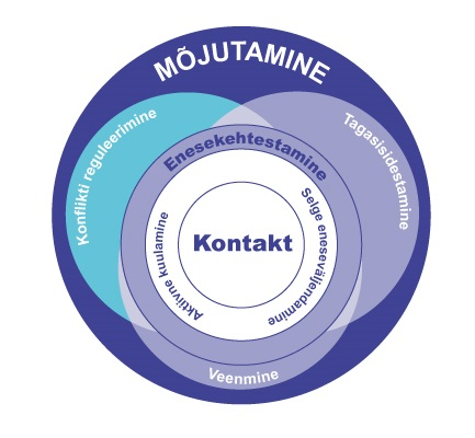 Suhtlemise kompleksoskuse - konflikti reguleeriise - seosed teiste suhtlusoskustega